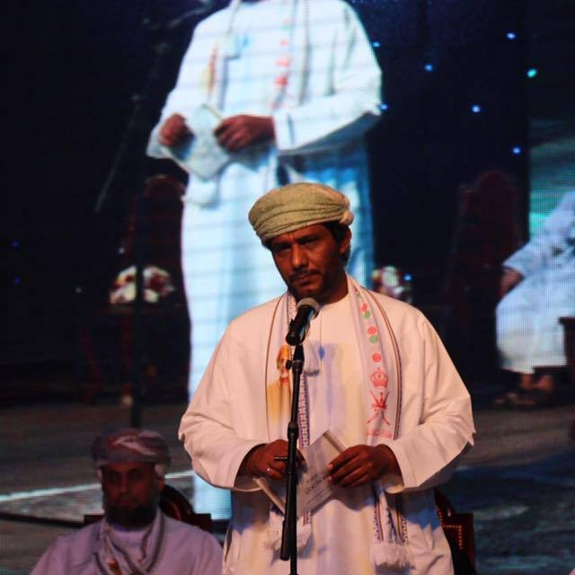 صورة احتفالية